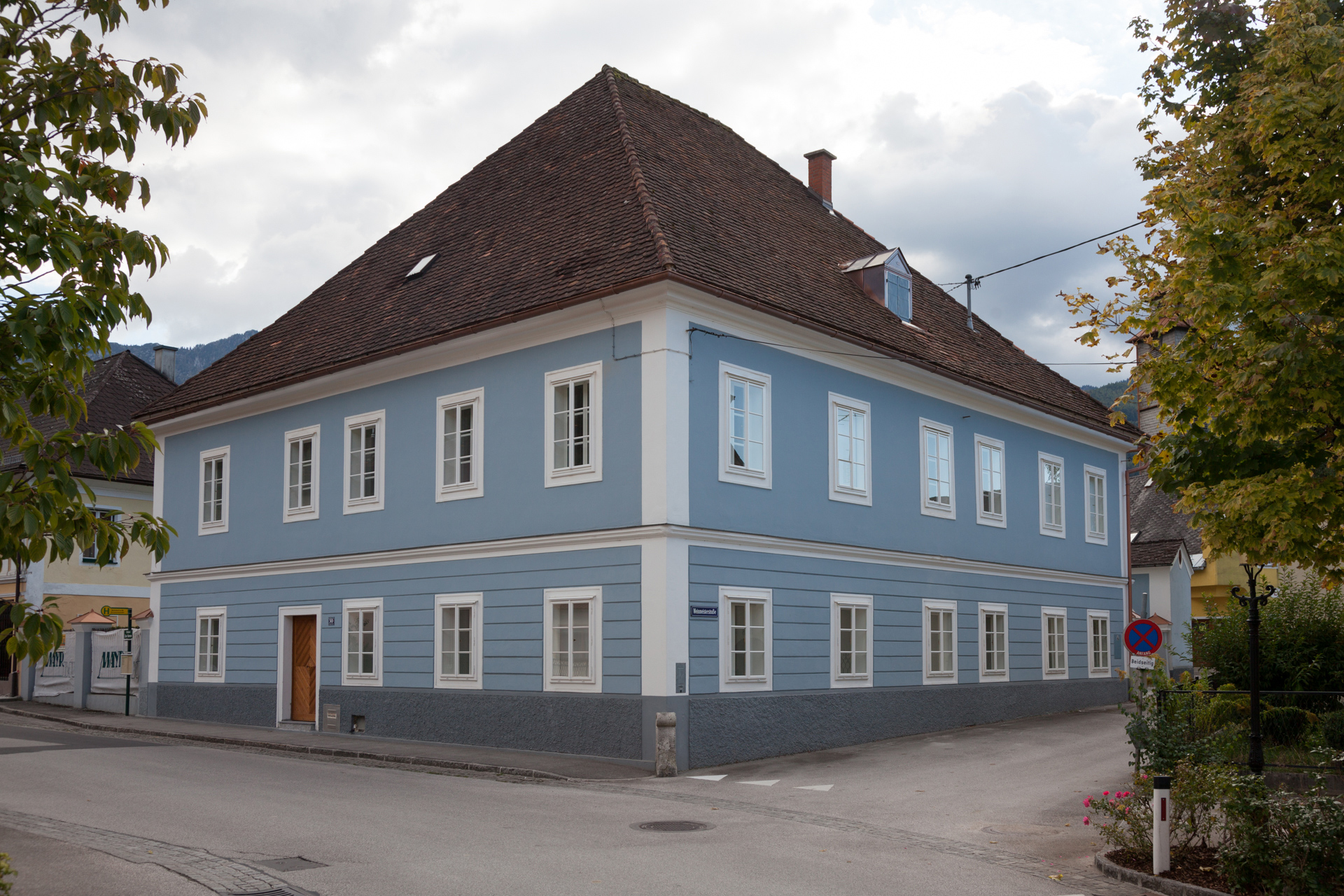 Neues Herrenhaus an der Zinne, Nordost-Ansicht. Architekt: Franz Höbarth, 1837 (Umbau)